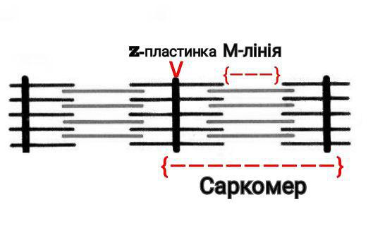 На рисунку зображено будову саркомерів